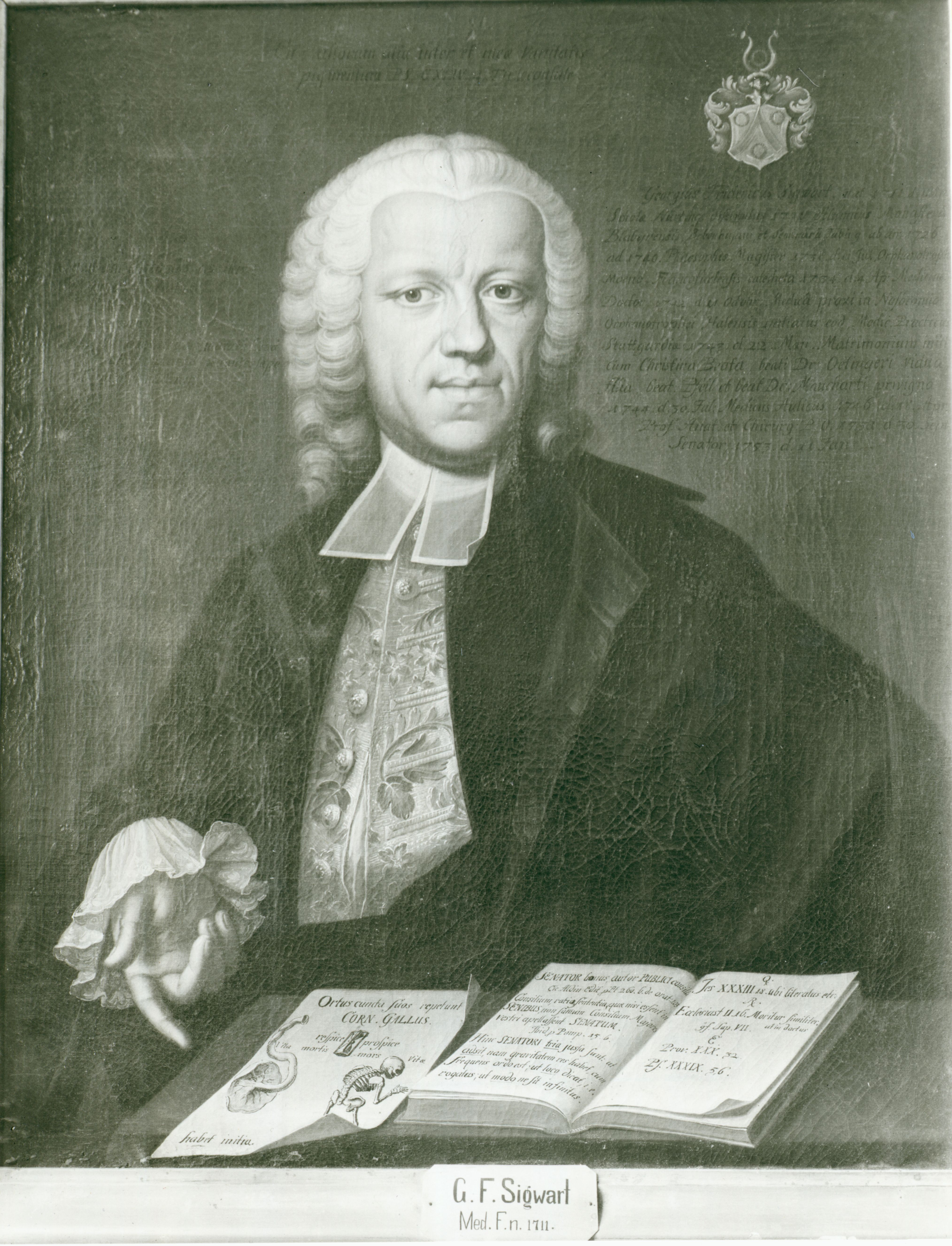 Prof. Georg Friedrich Sigwart, Gemälde in der Tübinger Professorengalerie